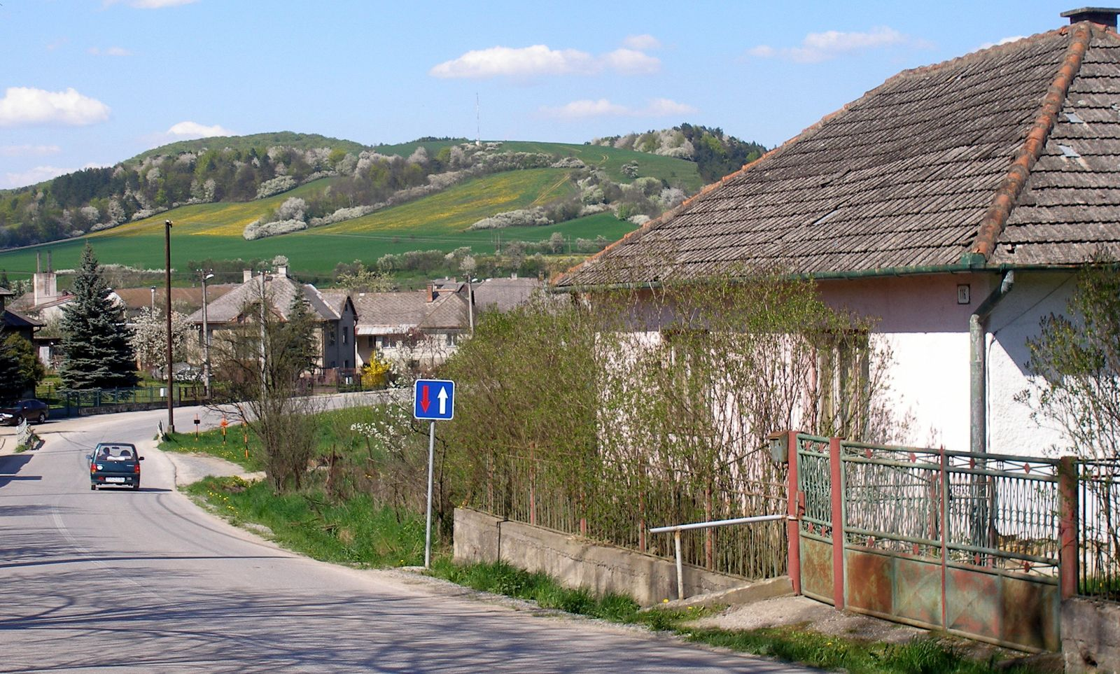 Obec Radatice a okolie. Okres Prešov, región Šariš.